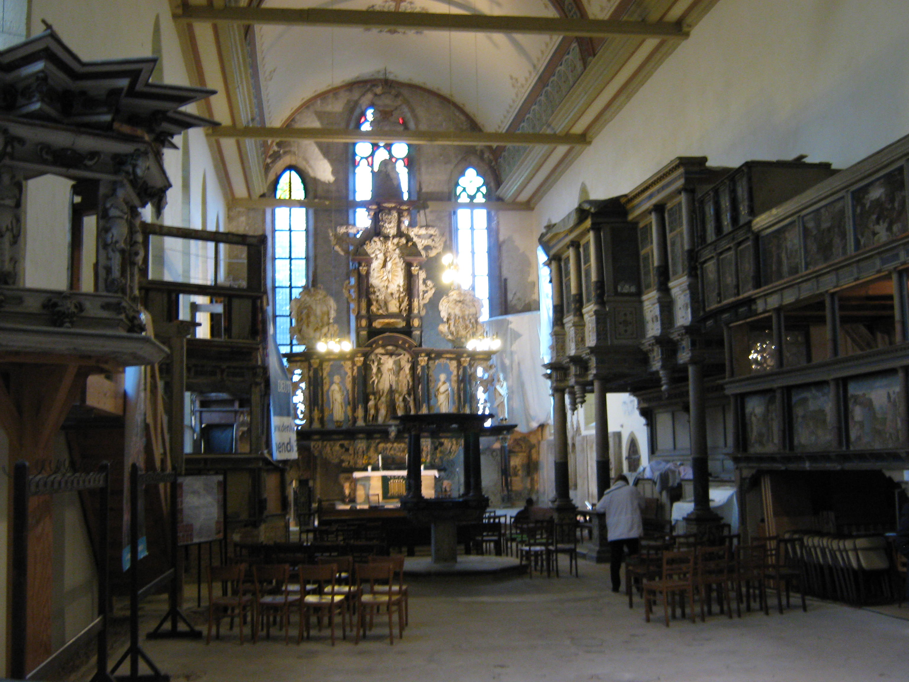 Oberkirche in Arnstadt, Inneres.